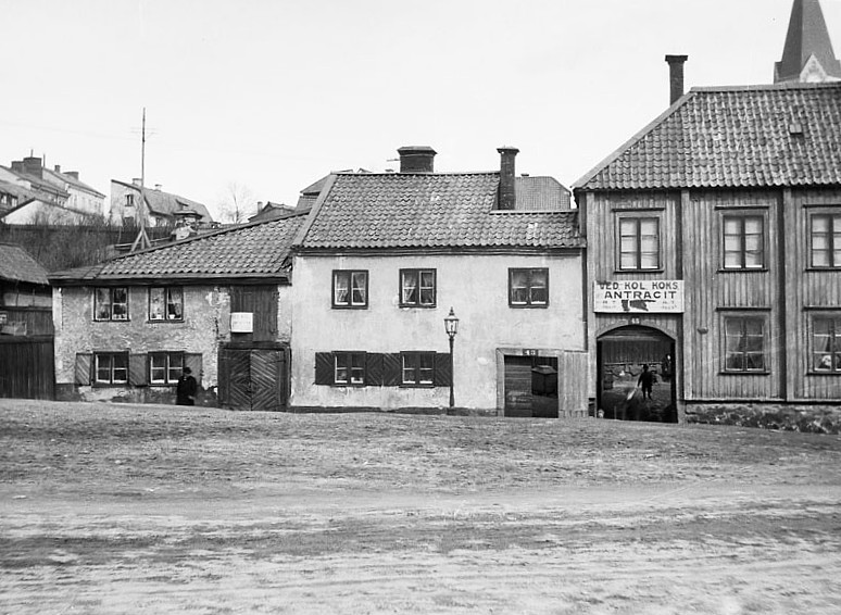 Nytorget österut mot Nytorget 41, 43 och 45. Nuv. Nytorget 5 -7. Skylt till ved, kol och koks. Sofia kyrkas torn i fonden.